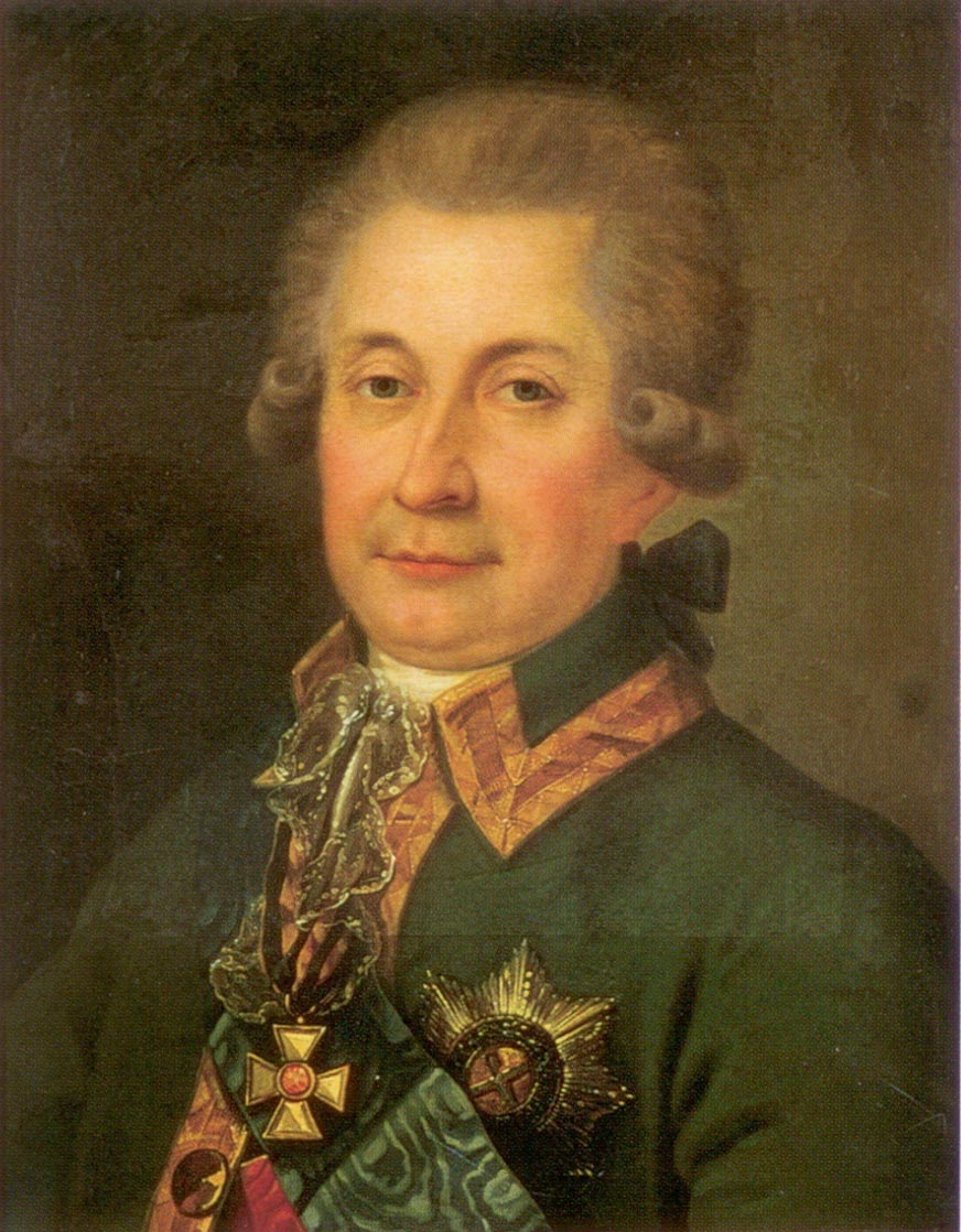 князь Юрий Владимирович Долгоруков (1740-1830) – генерал-аншеф